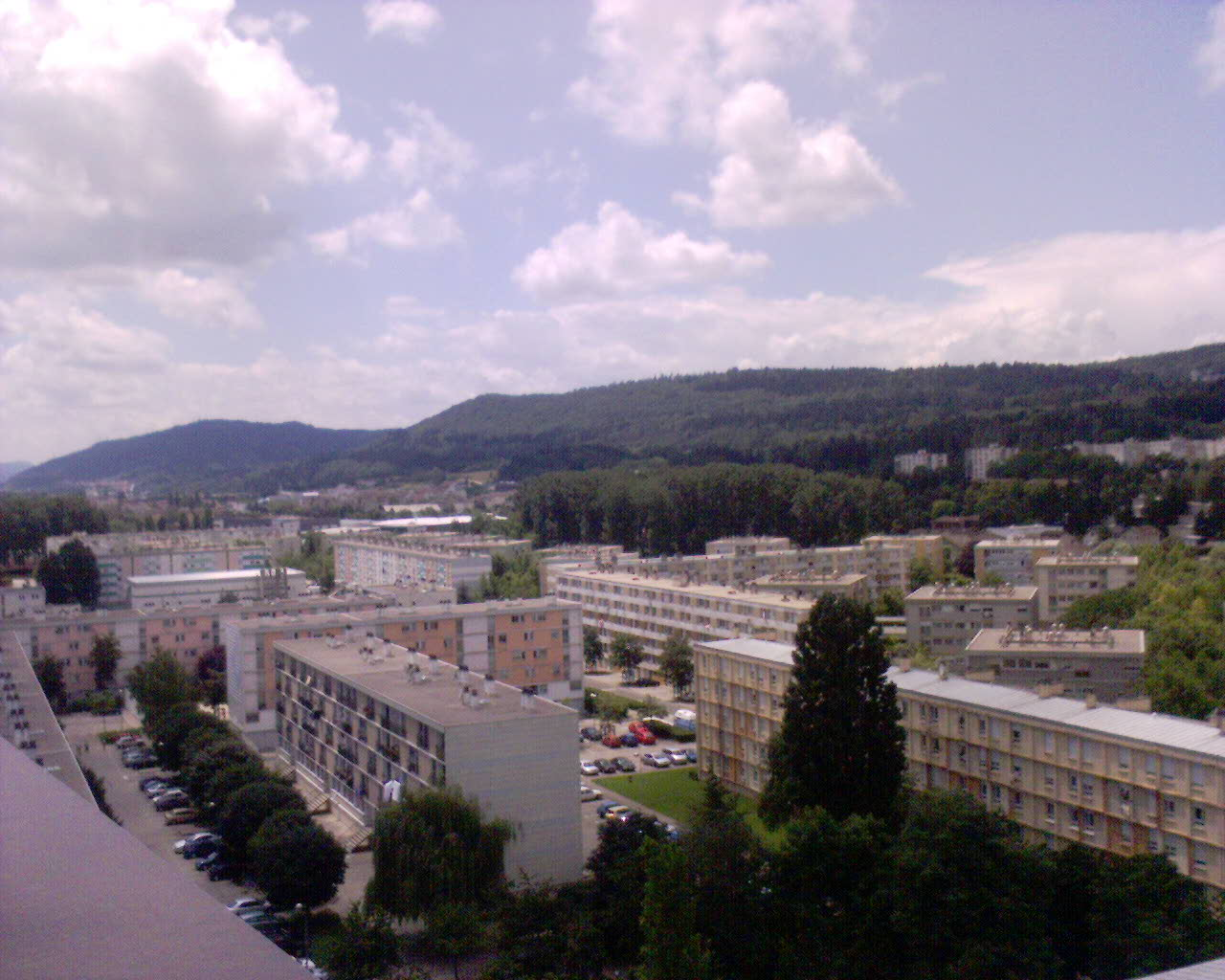 Quartier de la Plaine, Oyonnax, France